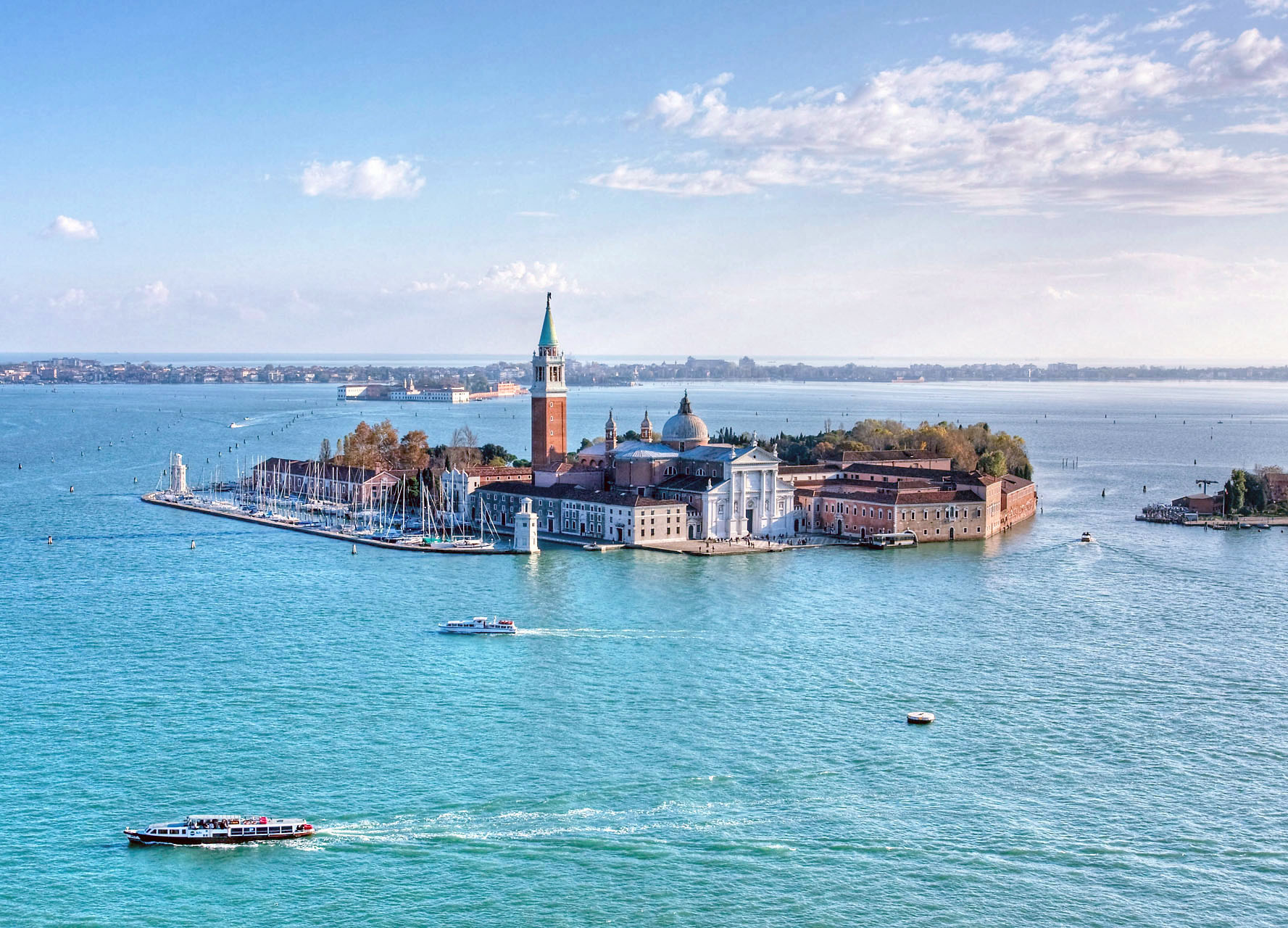 San Giorgio Maggiore / Venice, Italy